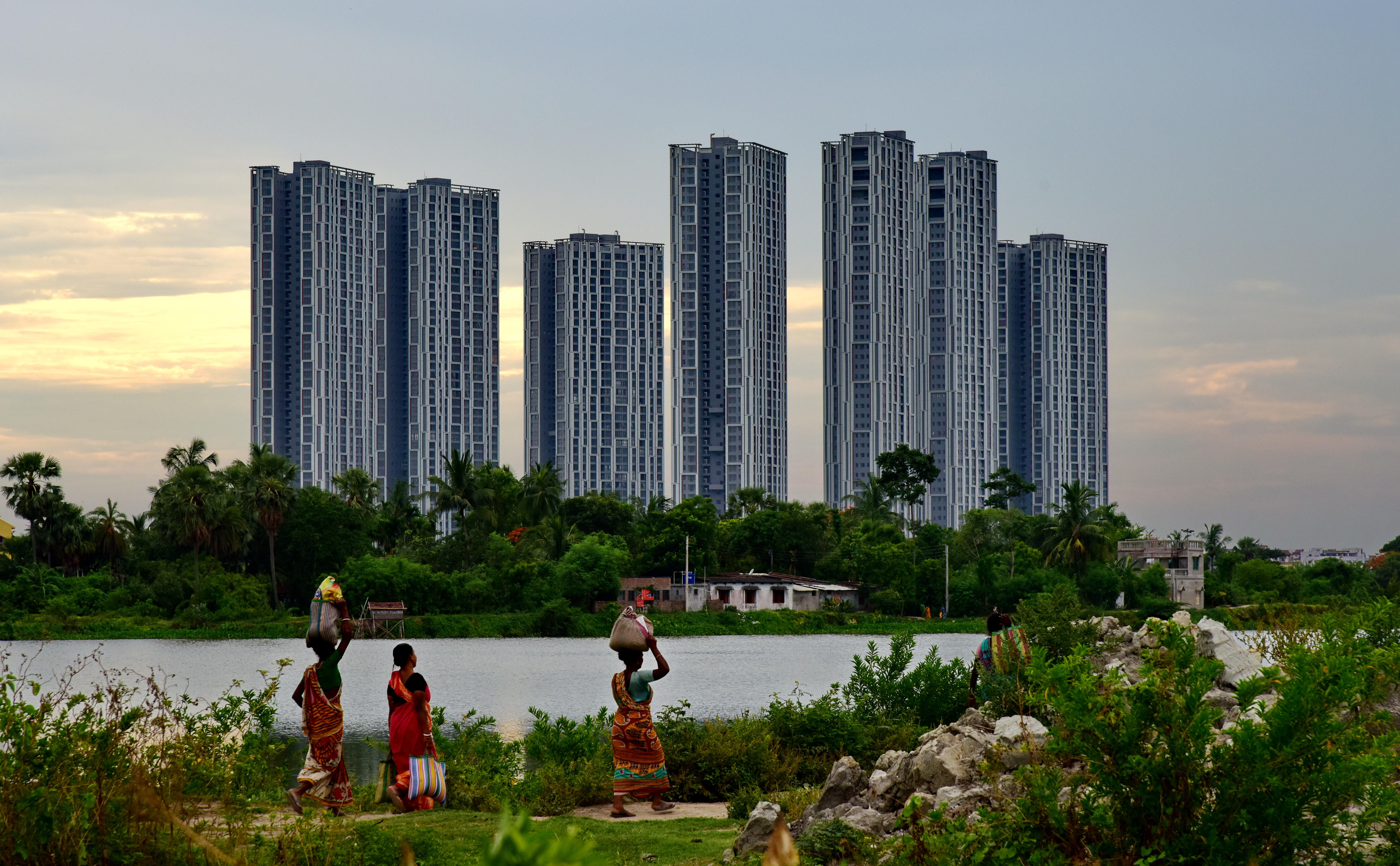 Kolkata Outskirts